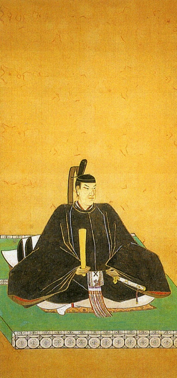 丹羽長祥の肖像画(市指定文化財)。